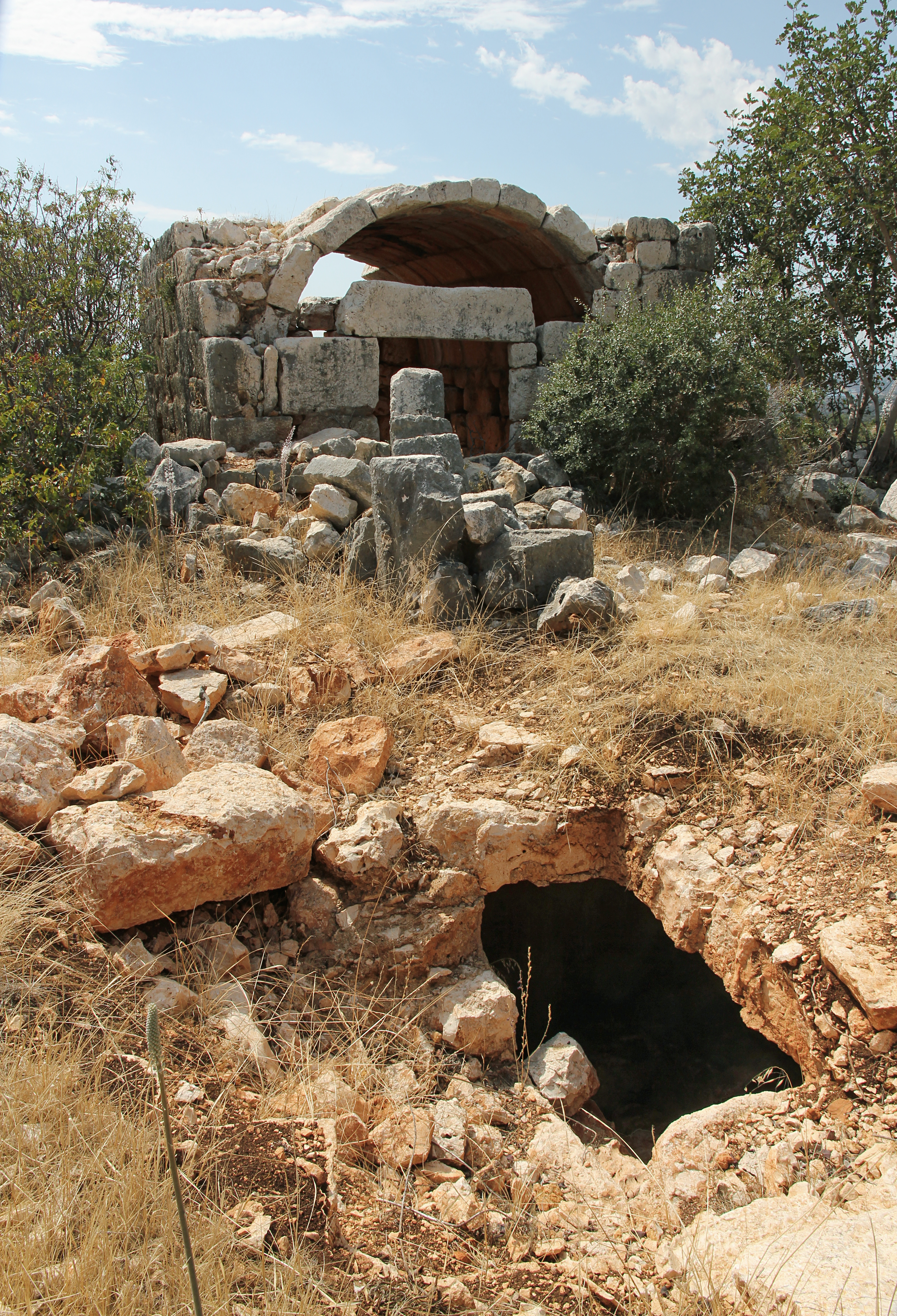 Hıdırlı, archäologische Stätte bei Kızkalesi in der Südtürkei, Privathaus mit Gewölbe, im Vordergrund Zisterne